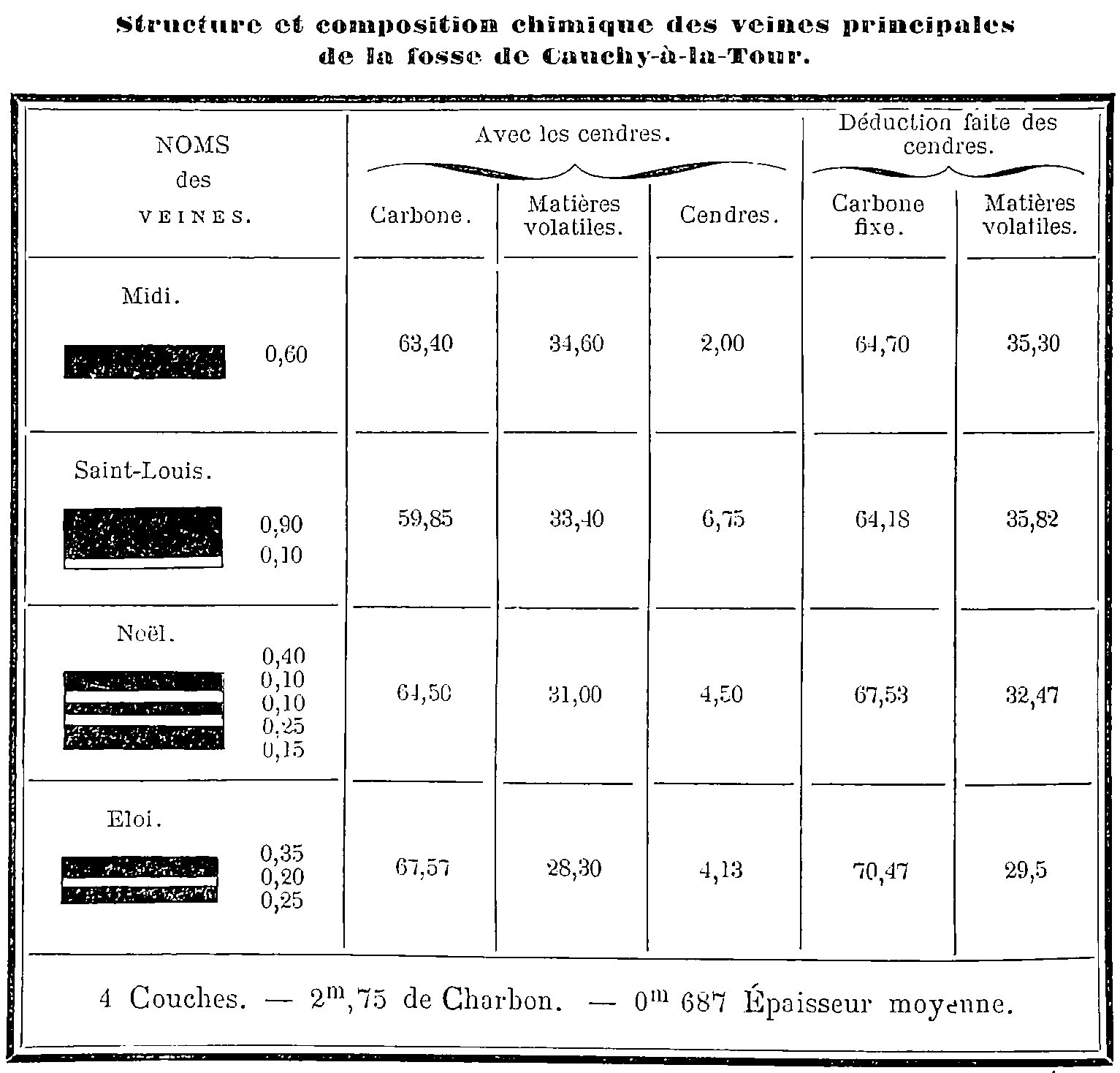 Veines principales recoupées à la fosse de la Compagnie des mines de Cauchy-à-la-Tour.